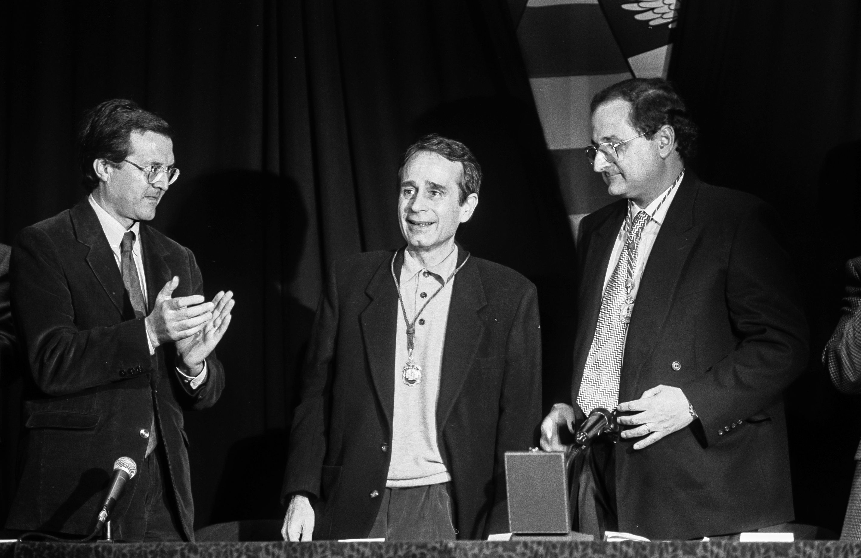 Concesión de la medalla Ciutat d'Alcoi.